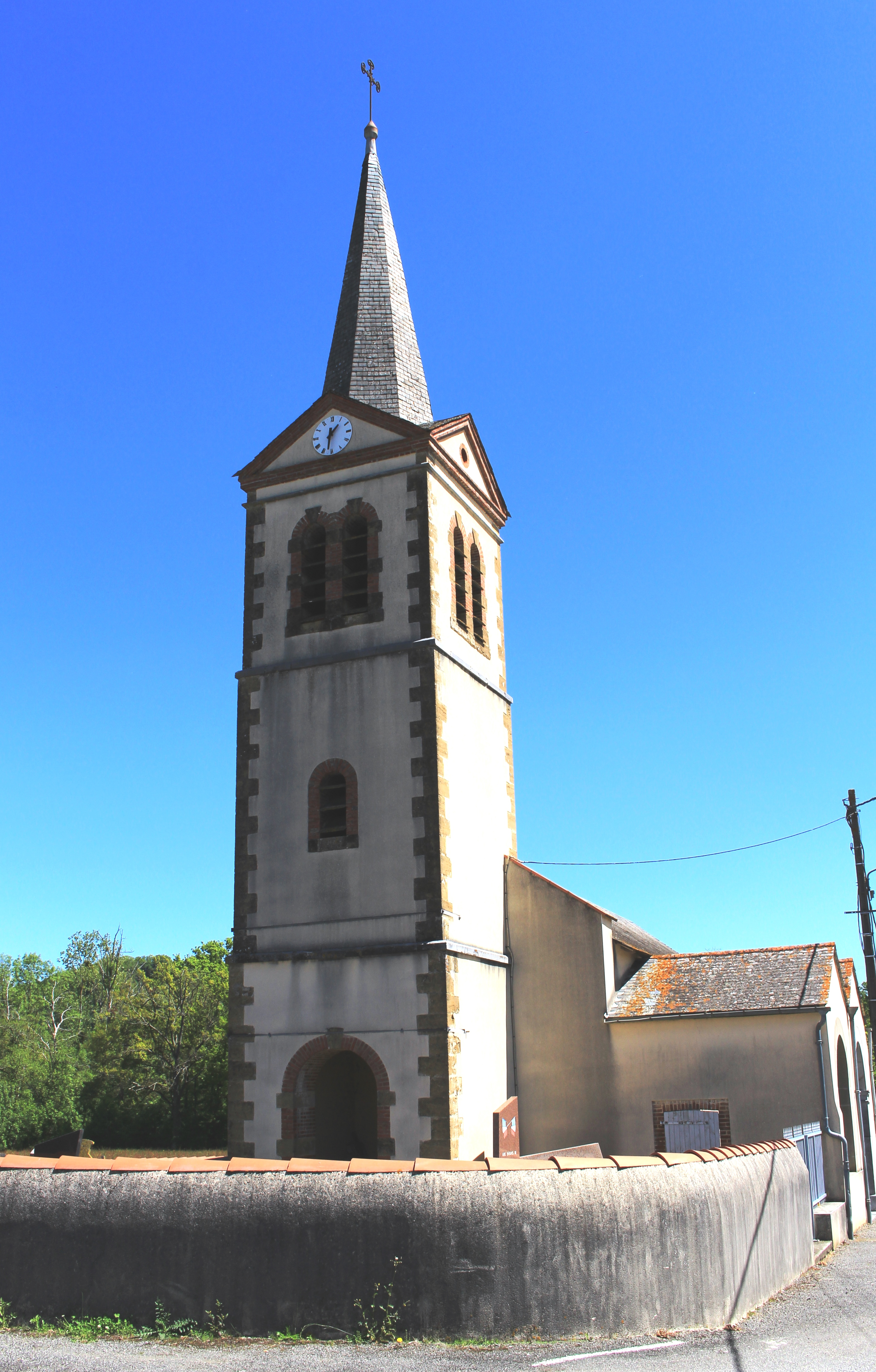 Église de de l'Assomption de Tournous-Darré (Hautes-Pyrénées)